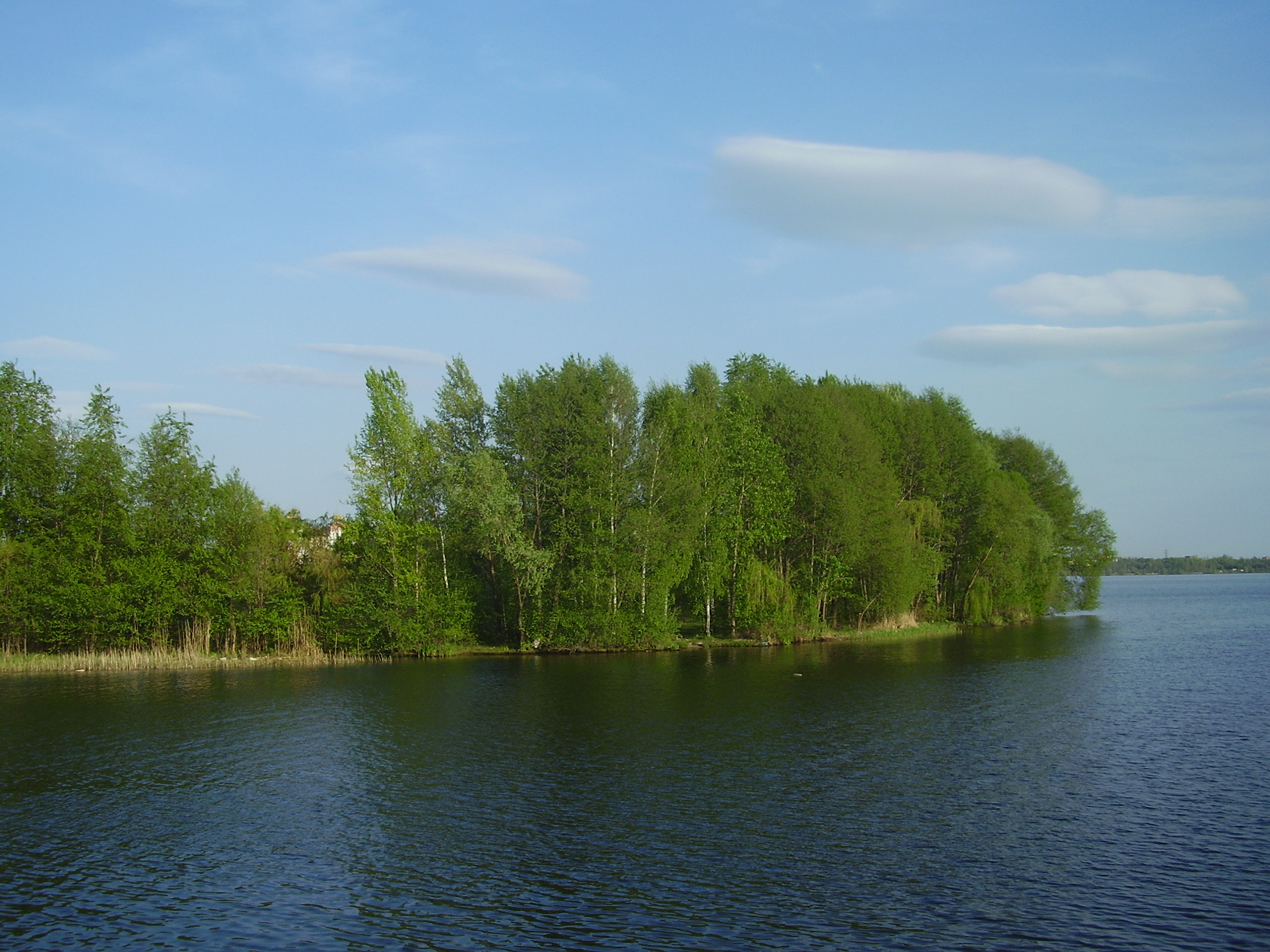 Воронеж,остров на водохранилище у Чернавского моста